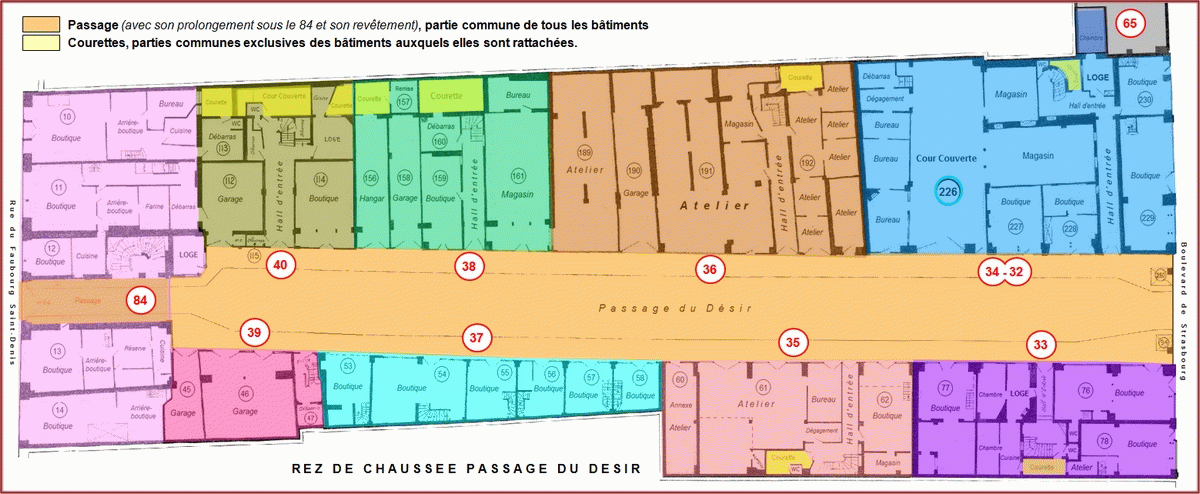 Plan entre Fbg Saint Denis et Bd de Strasbourg